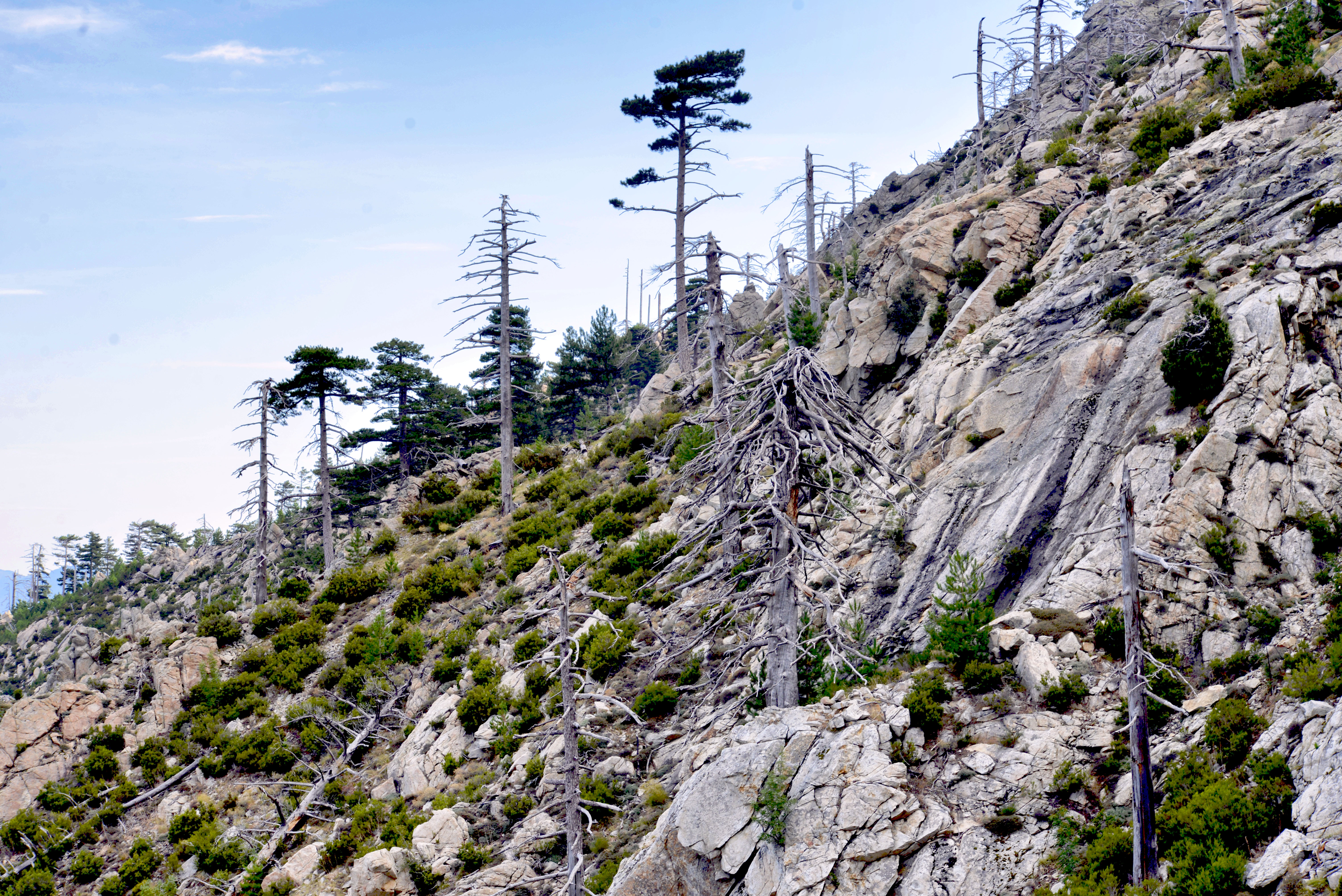 Muracciole, Centre Corse - Stigmates sous le col de Sorba de l'incendie en 2000 dans la forêt de Rospa-Sorba